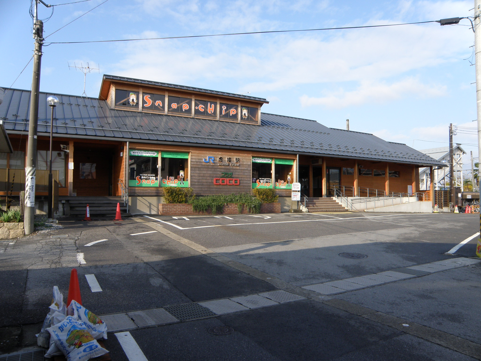 虎姫駅 正面外観